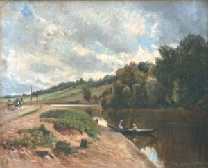 Paysage De Rivière Animé